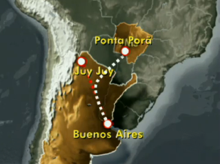 Rota do avião argentino que fez um pouso de emergência em Ponta Porã.